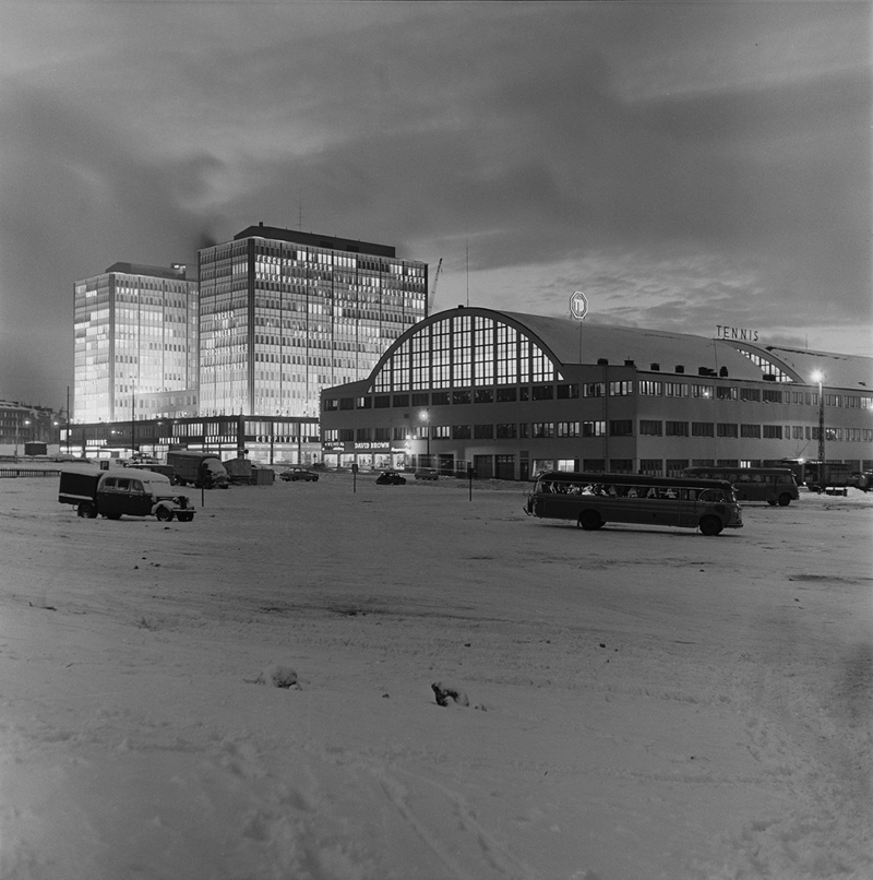 Tennispalatsi vuonna 1958